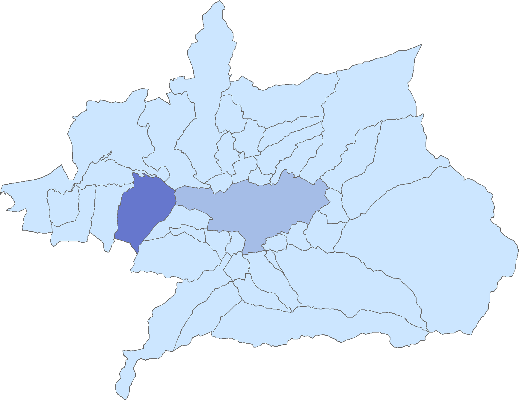 Situación del municipio de Santa Fe respecto a la comarca de la Vega de Granada, en España.